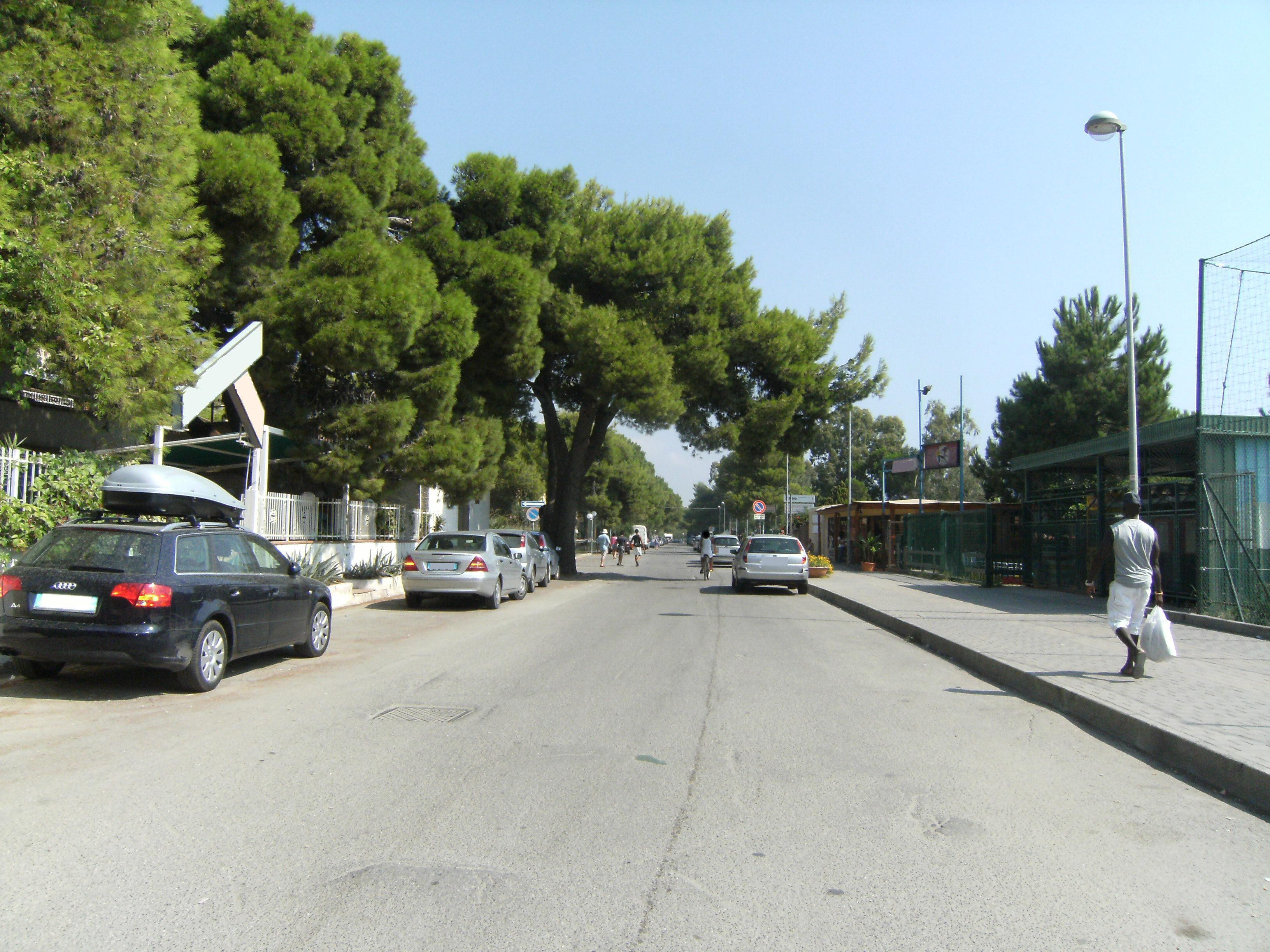 via Lungomare, Villapiana - frazione Lido (CS)